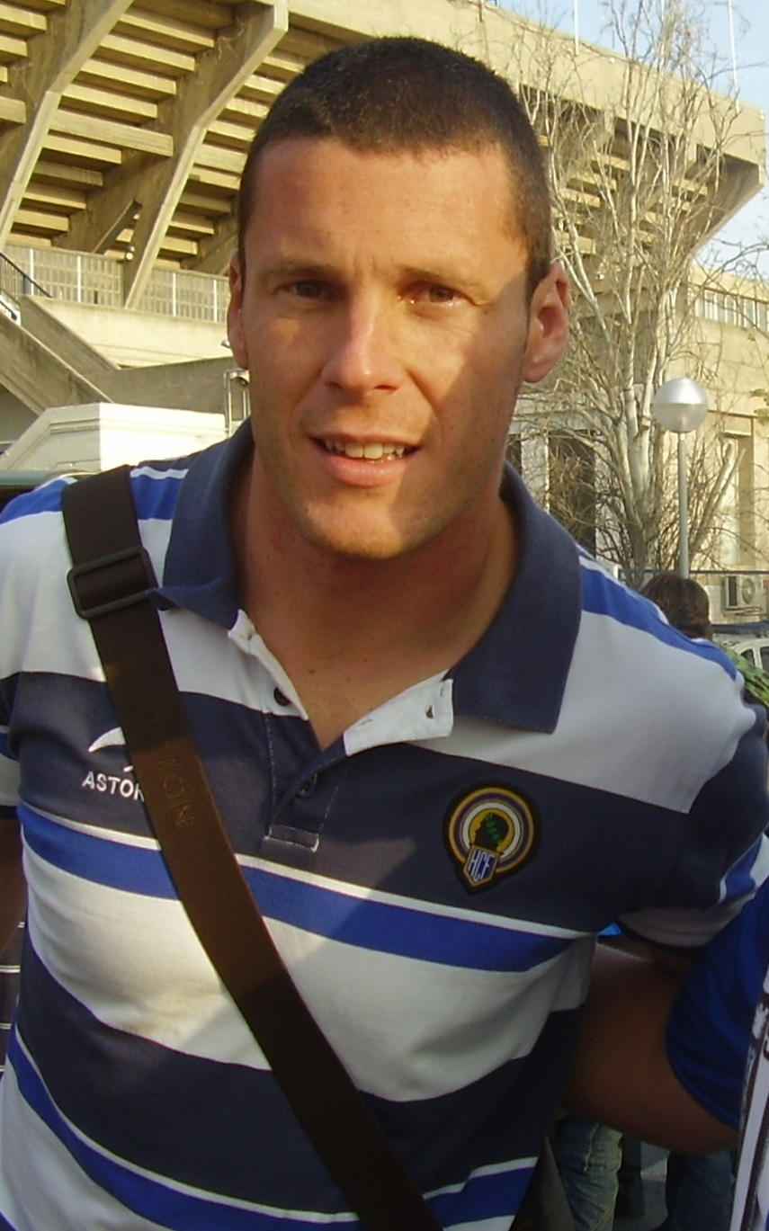 Juan Jesús Calatayud, portero del Hércules CF.